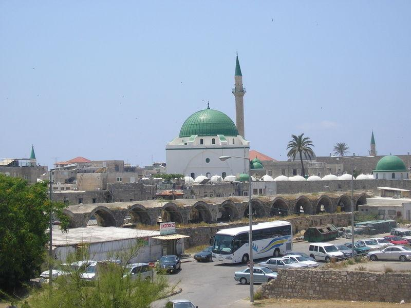 Al-Jazaar Mosque in Acco (Acre), Israel. מסגד אל ג'זאר בעכו. שורת הקשתות הינה גגו של השוק הלבן שנבנה על ידי דאהר אל עומר.